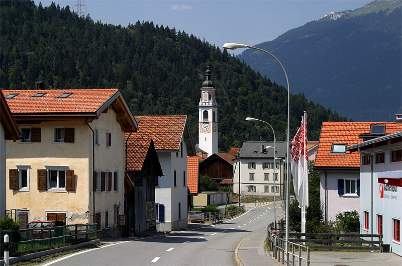 Rhäzüns